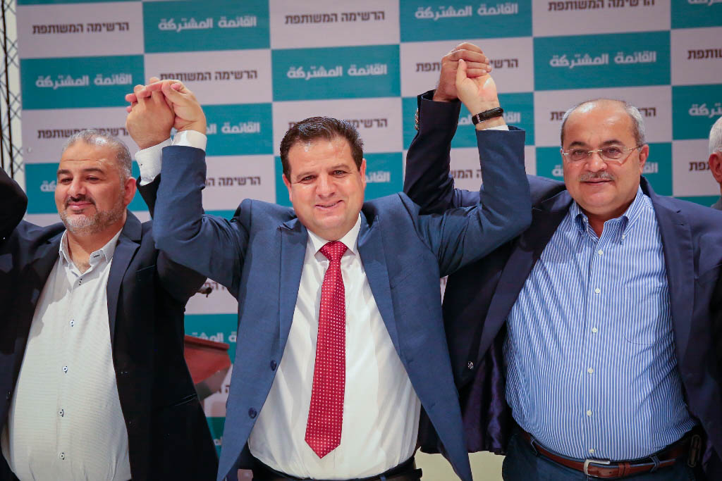 מימין ח"כ אחמד טיבי ח"כ איימן עודה וח"כ מנסור עבאס בזמן ההכרזה על הקמת הרשימה המשותפת